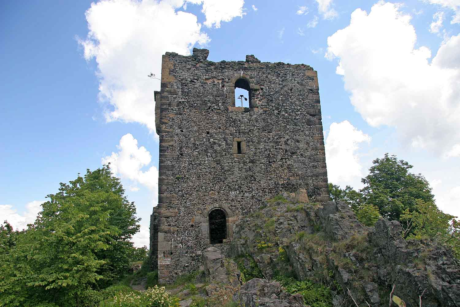 hrad Ralsko - zřícenina věže